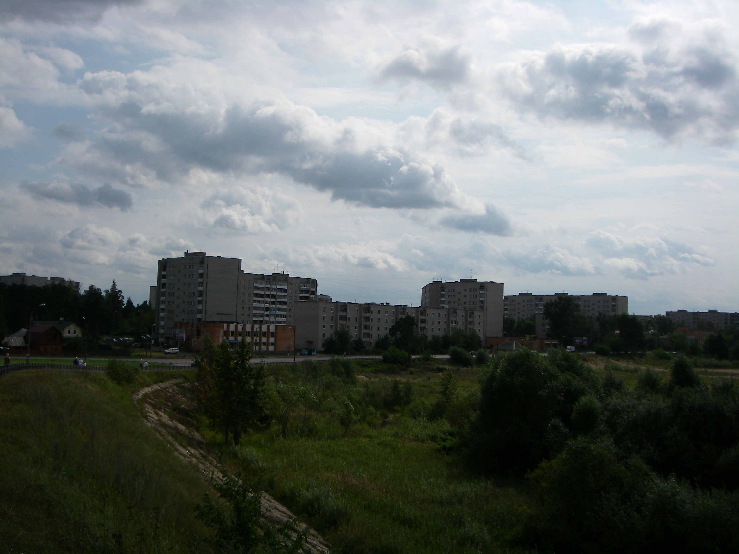 Kimri - urbo en Tverja provinco